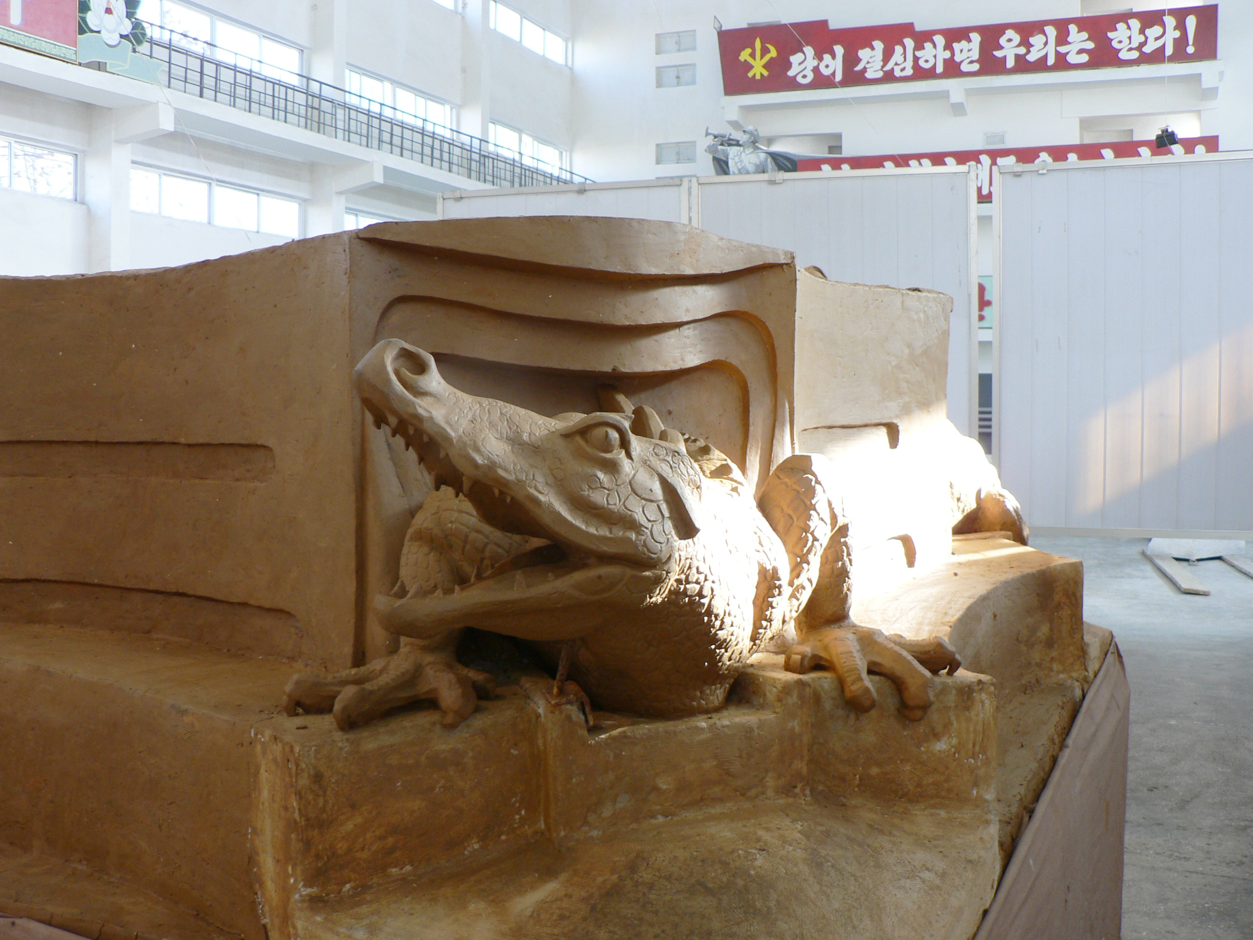 1:1-Tonmodell des Frankfurter Märchenbrunnes in den Mansudae Art Studios in Pjöngjang. November 2005